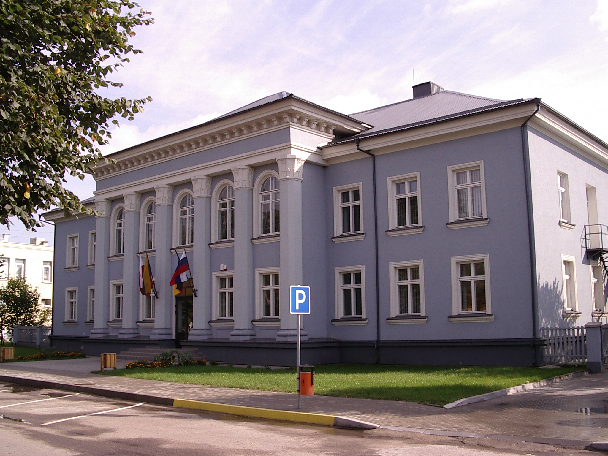 Город Казлу-Руда